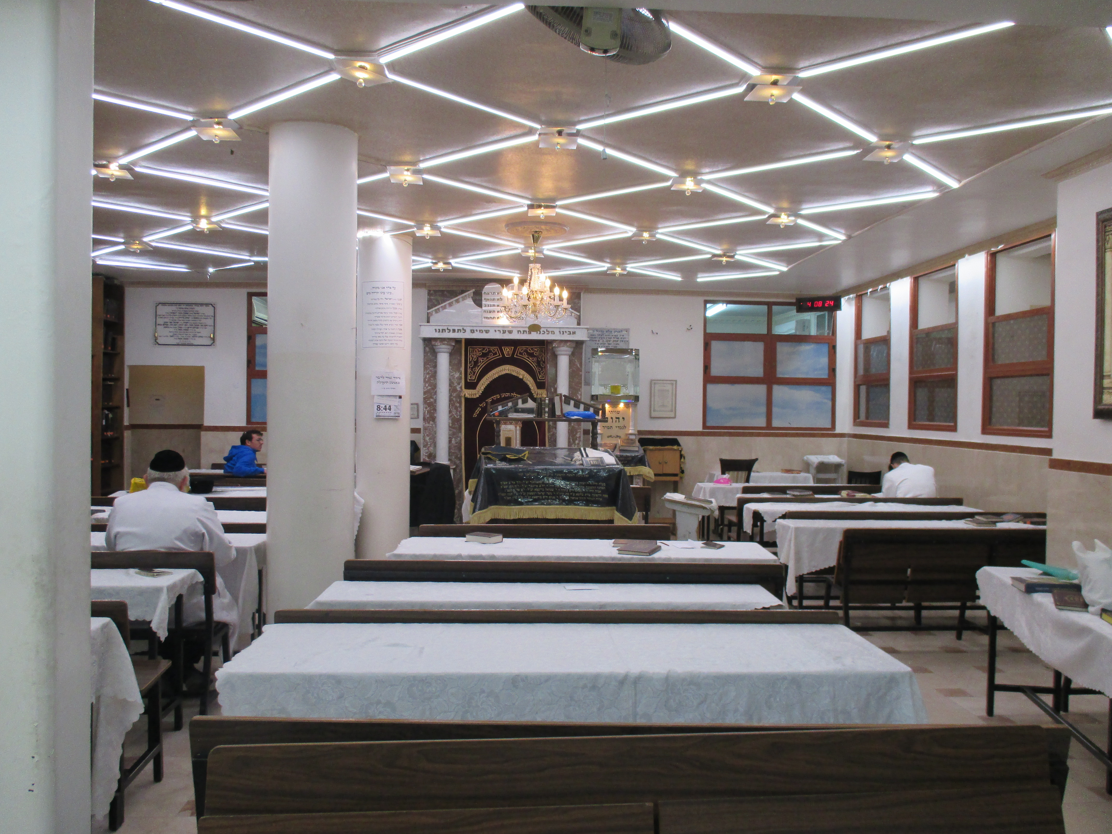 פנים בית המדרש של העדה בבניין זופניק